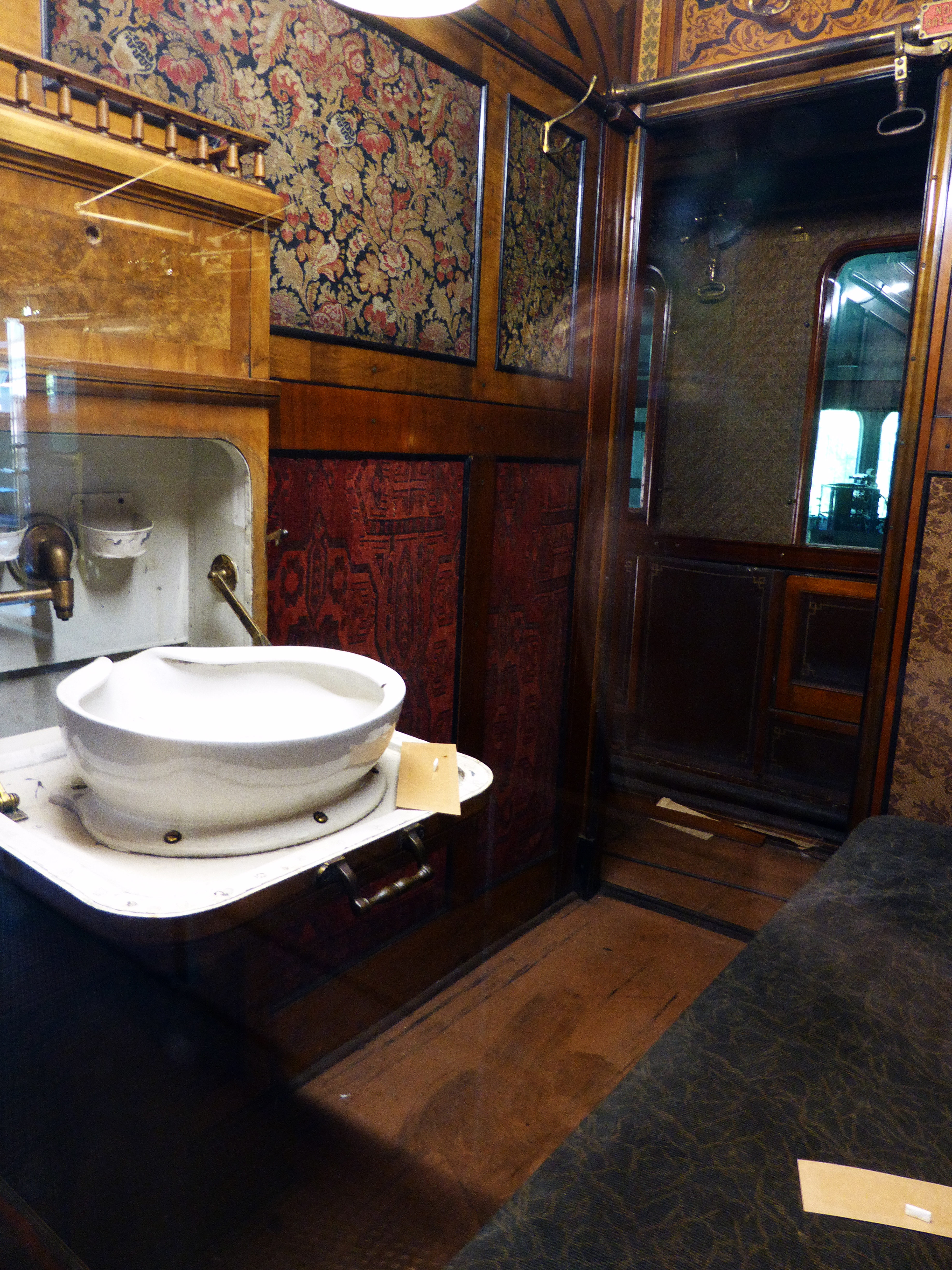 Hofzug Kaiser Wilhelms II. (Interieur), Baujahr 1888. Breslauer Aktiengesellschaft für Eisenbahnwagenbau. Interieur gestaltet durch Otto Lessing. Ausgestellt im Deutschen Technikmuseum in Berlin. Wikipedianische KulTour am 10. Oktober 2015 in der Ausstellung des Museums.